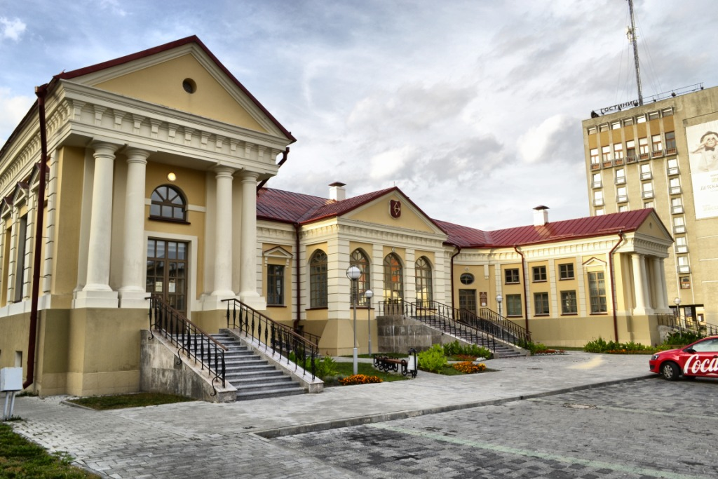 Беларуская (тарашкевіца): Будынак былога палаца Бутрымовіча. г. Пінск This is a photo of Belarusian heritage monument. Reference number: 112Г000539 ( WLM)